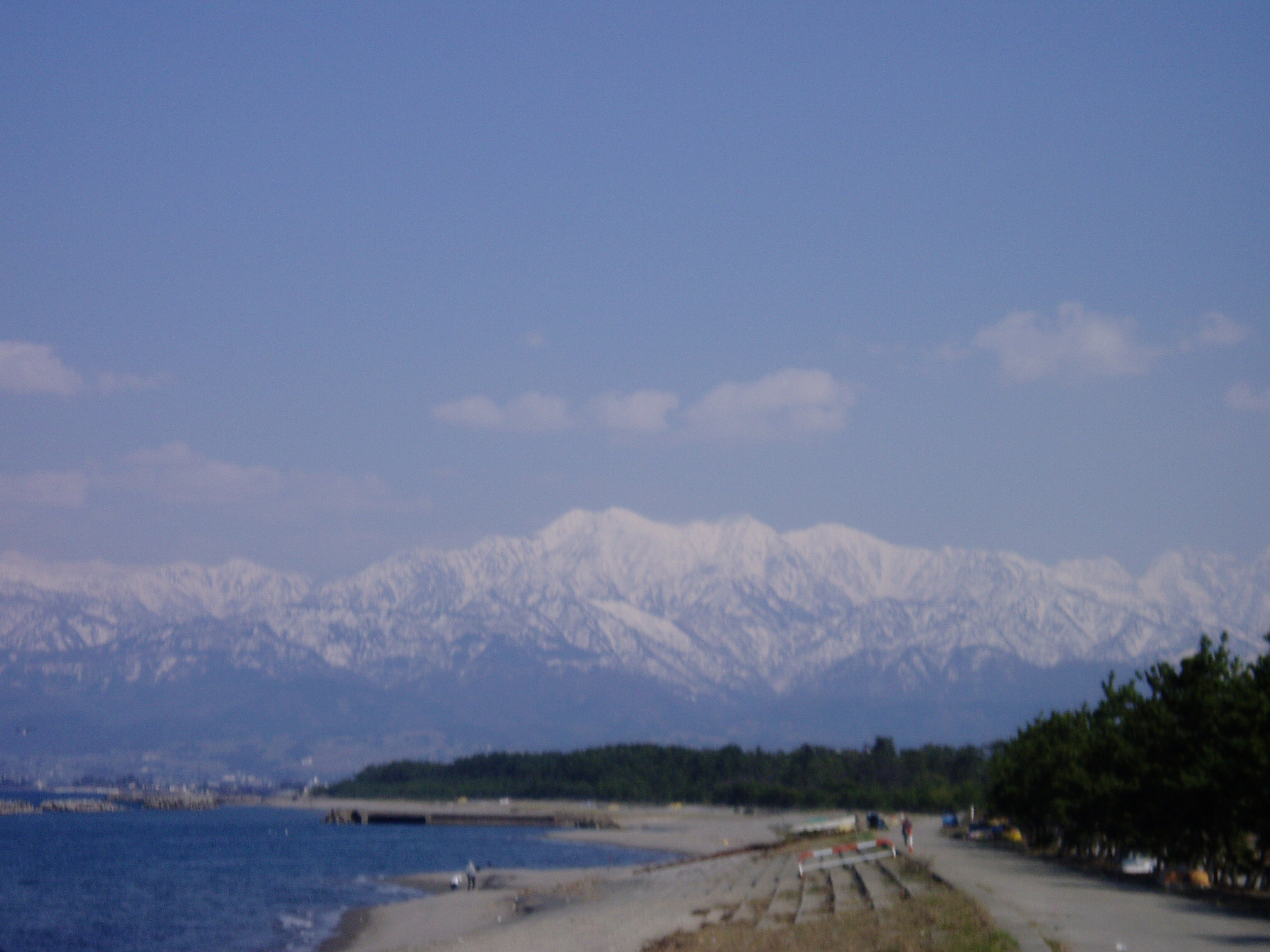 立山連峰と富山湾